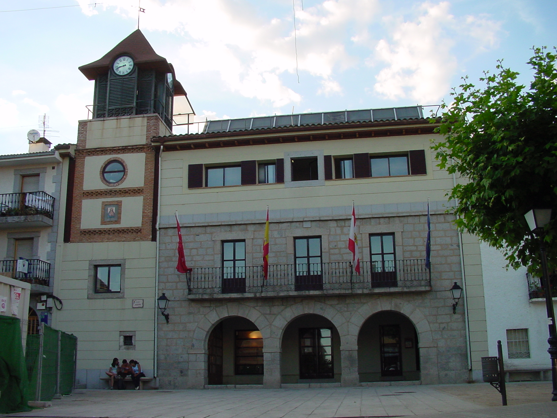 Ayuntamiento de Collado Mediano.